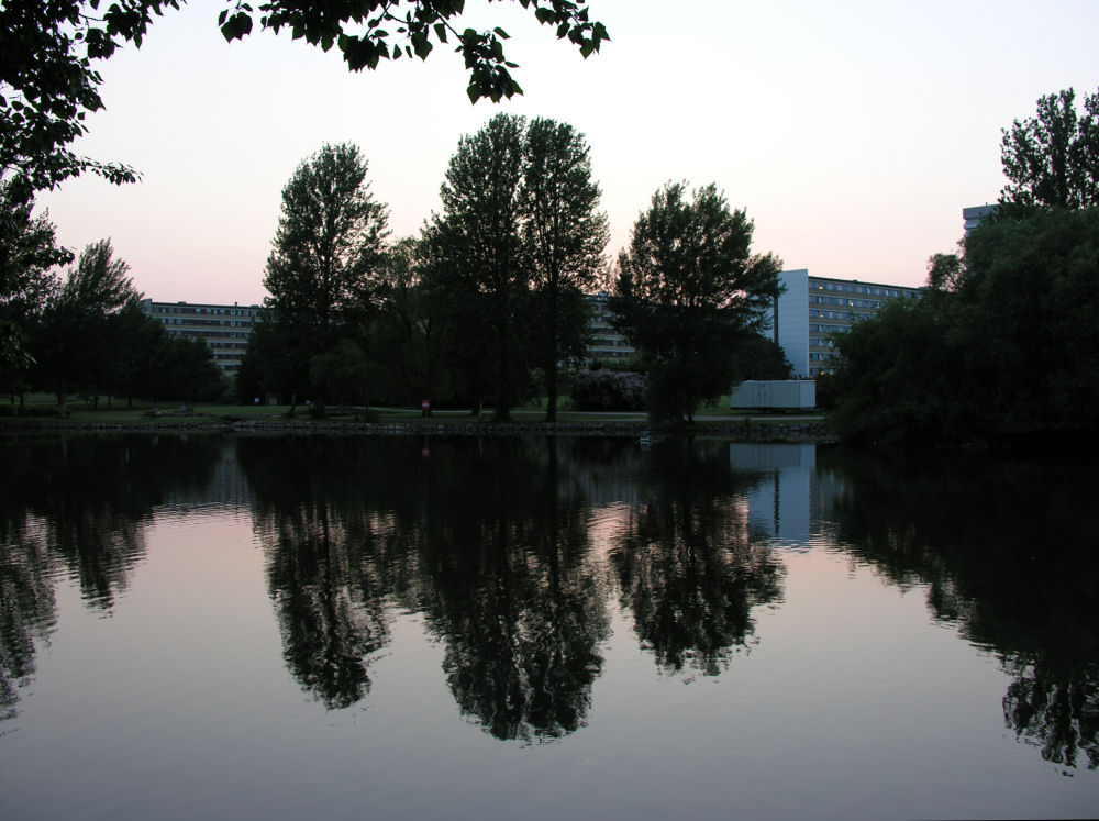 Rebæk Sø